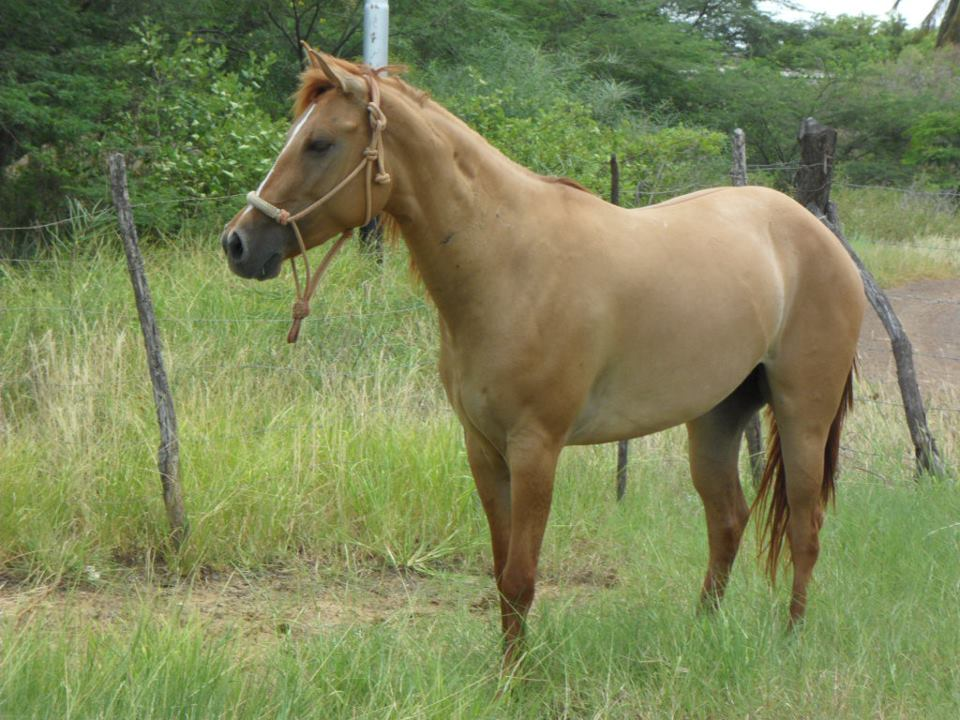 Equus ferus caballus Hato Santa Rosa, Estado Apure, Venezuela